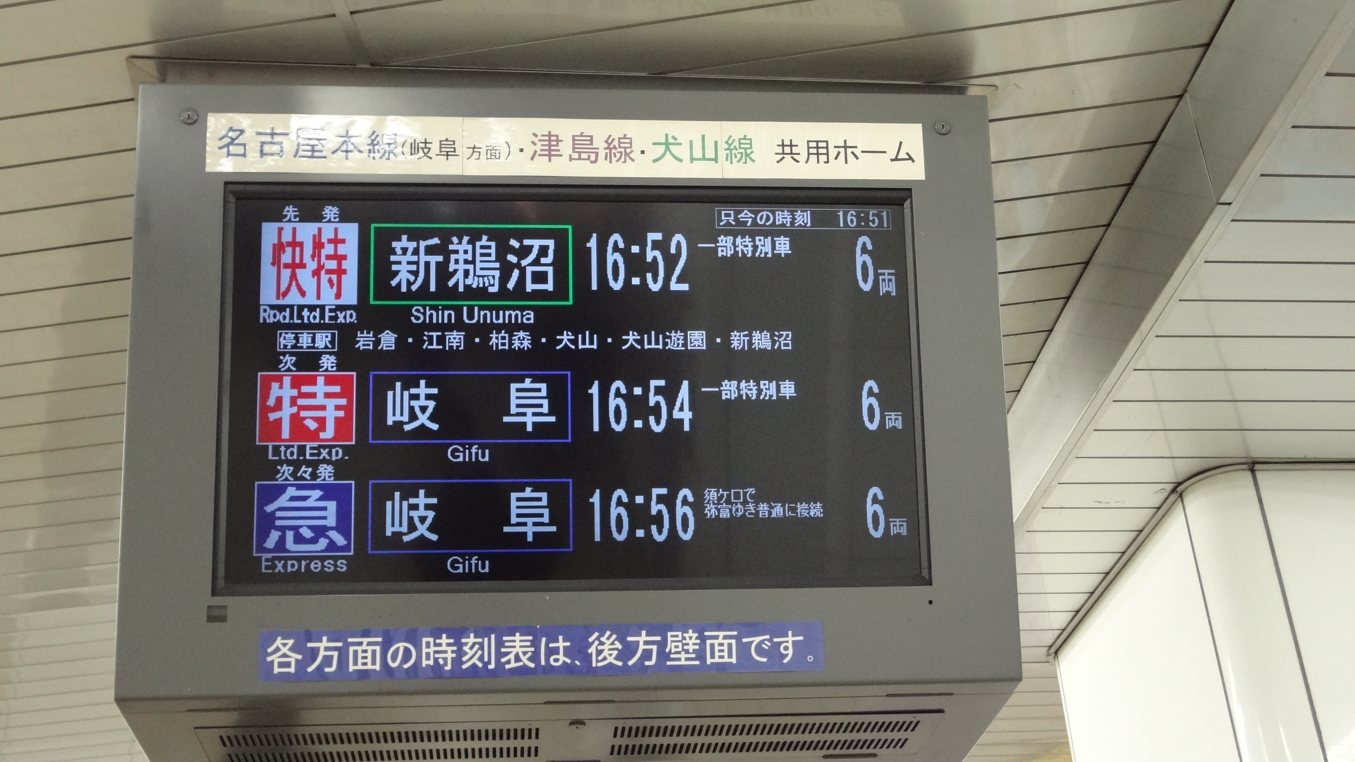 名鉄名古屋駅ディスプレイ 表示例